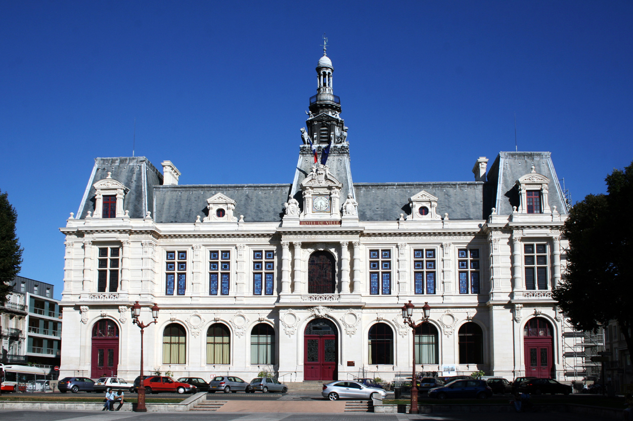 Hôtel de ville de Poitiers ( Vienne )